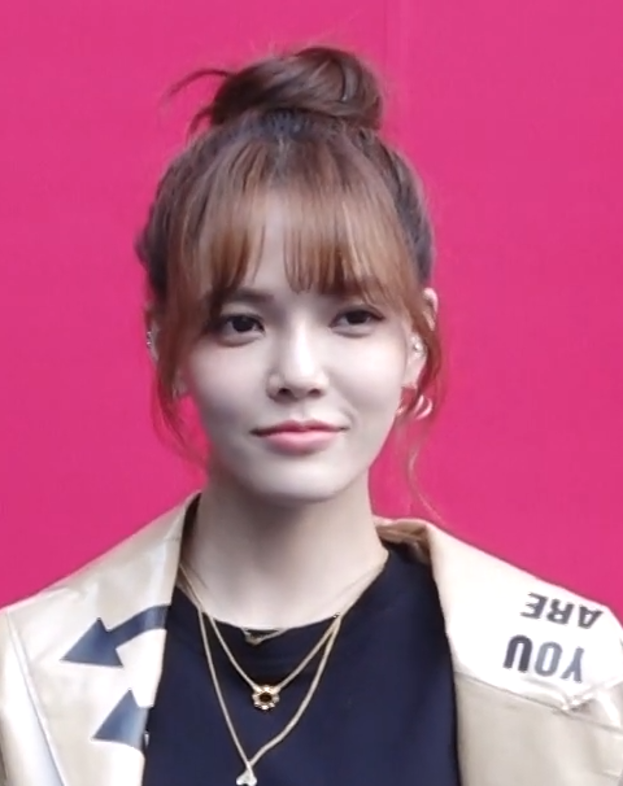 AOA(지민), “눈빛으로 올킬”… 과감한 패션.